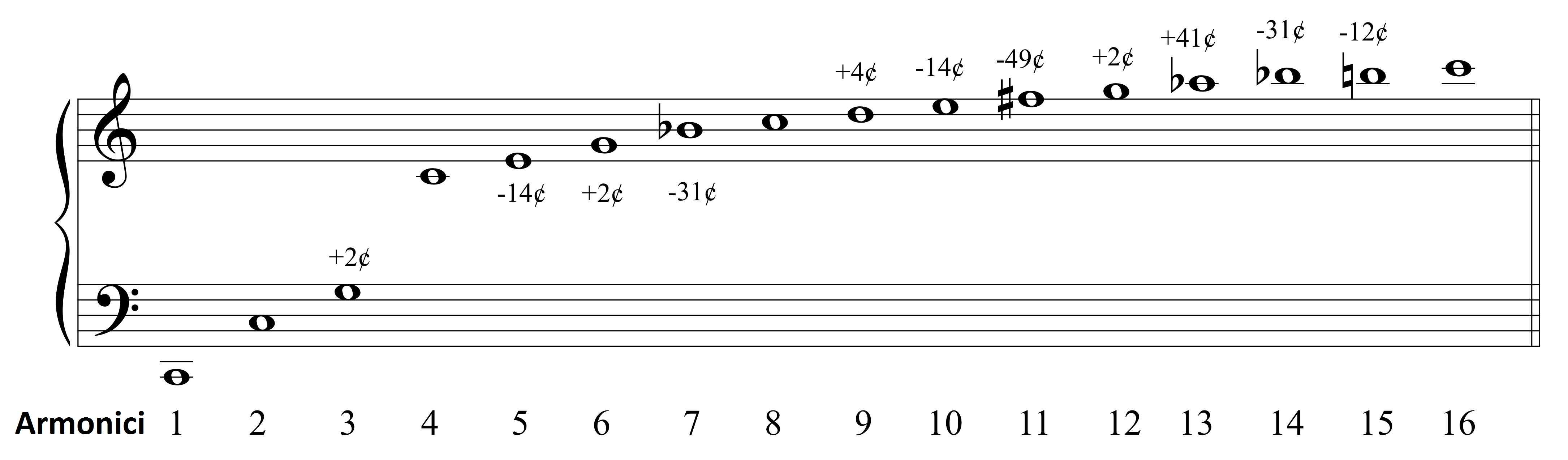 La serie degli armonici naturali, rappresentata su pentagramma. I centesimi di tono indicati su alcune note indicano la differenza rispetto alla scala temperata utilizzata negli strumenti musicali occidentali.